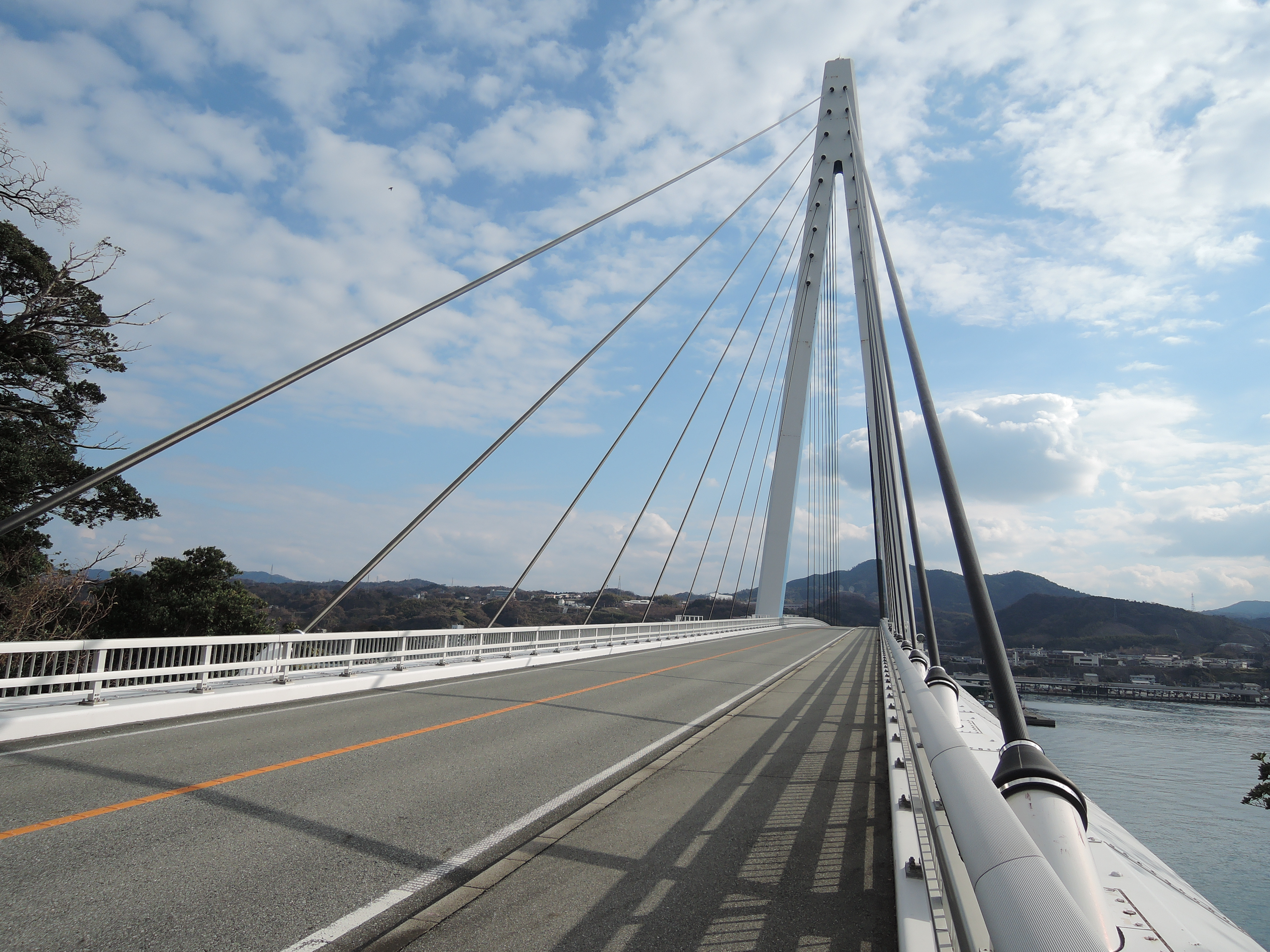 浜田マリン大橋